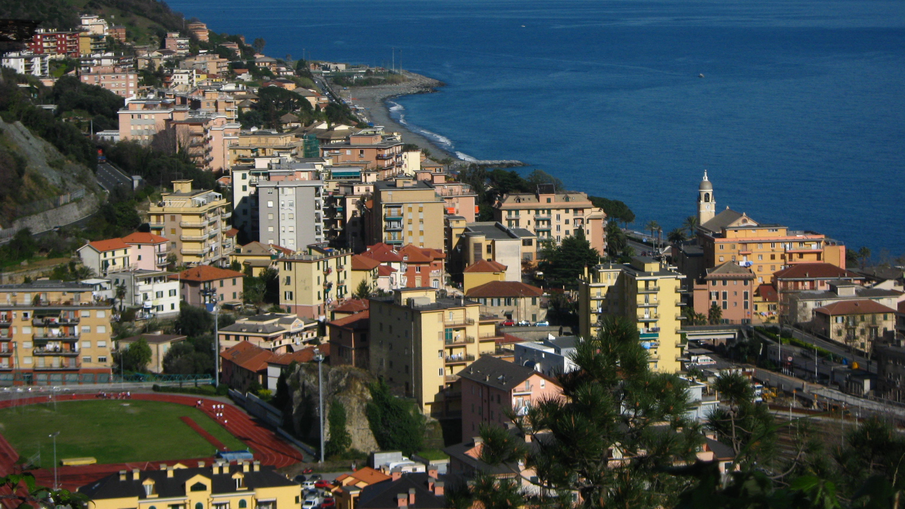 Foto aerea di Cogoleto.